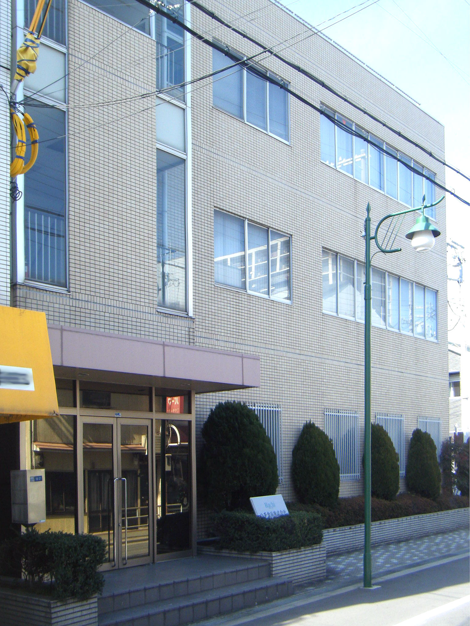 ハチ食品 本社